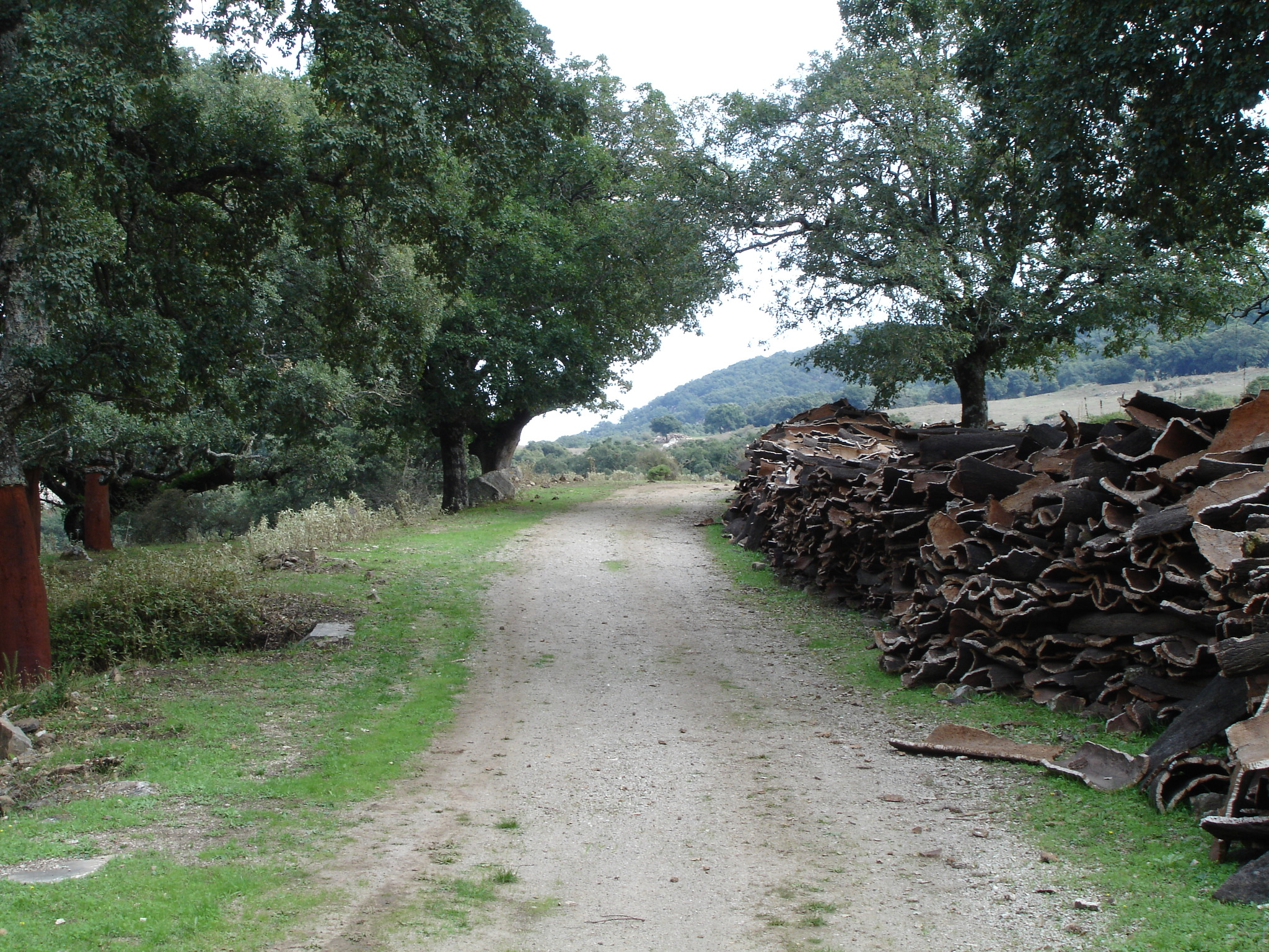 Corcho recolectado junto al sendero de la Sauceda, Los Alcornocales (Spain)